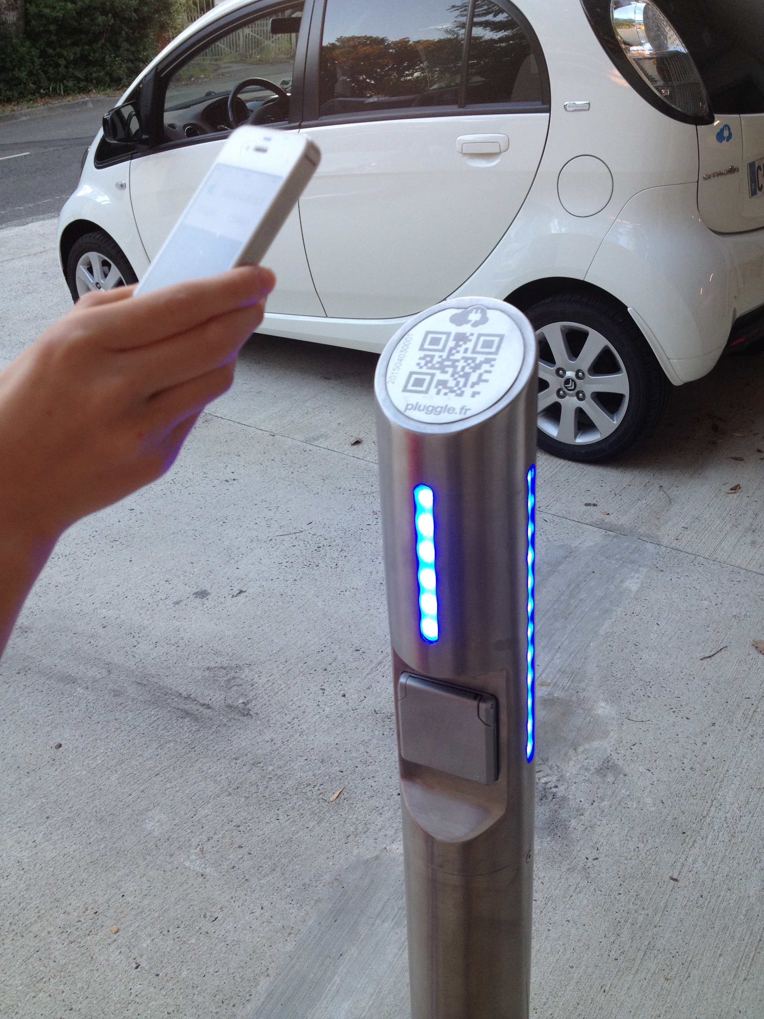 Déblocage d'une borne lente de recharge de véhicule électrique avec un smart-phone